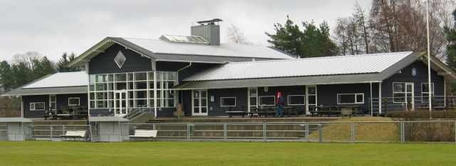 Værløse Boldklubs klubhus